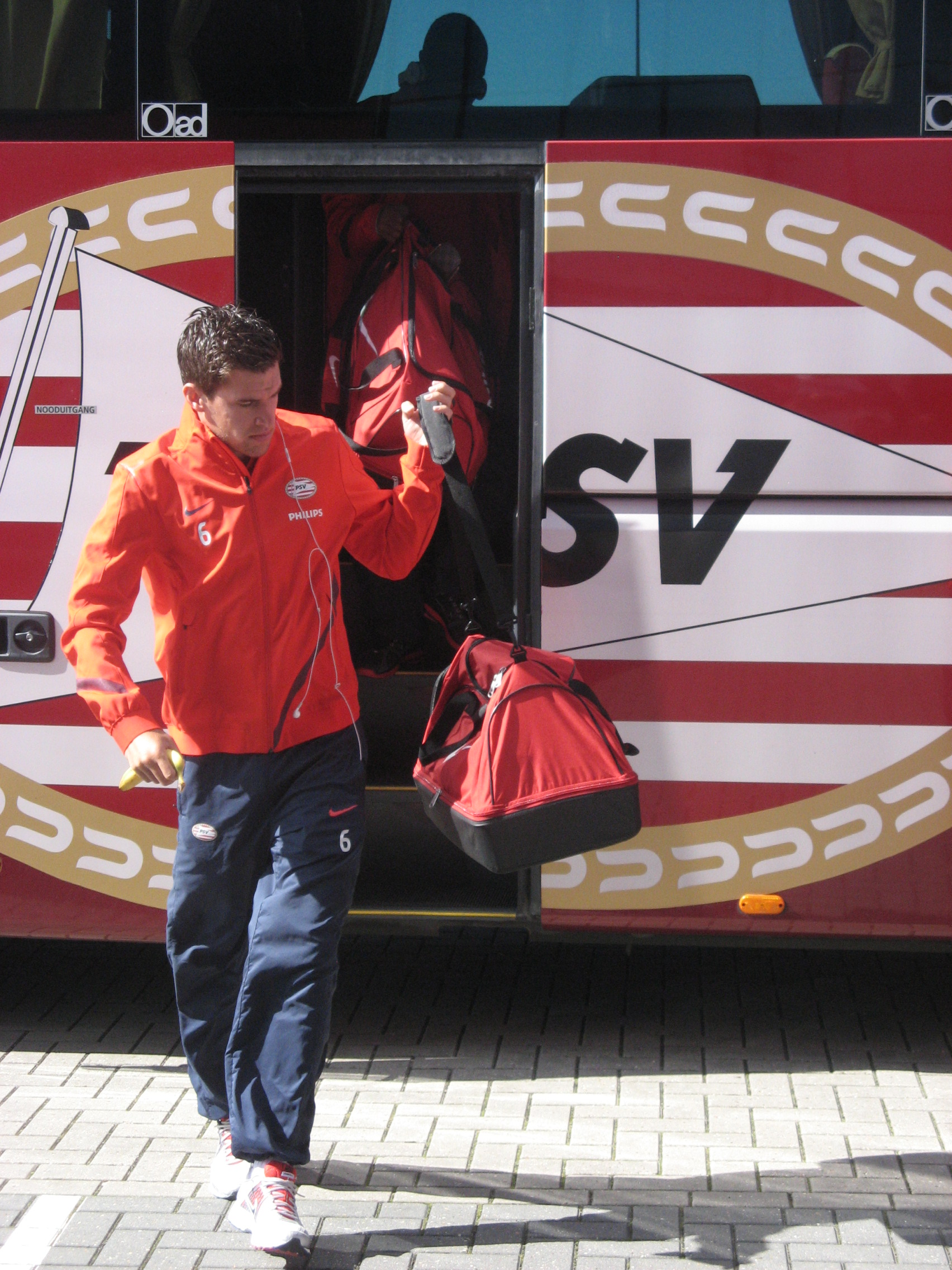 Kevin Strootman als speler van PSV, stapt de bus uit voor de competitie wedstrijd tegen AZ Alkmaar in Afas stadion